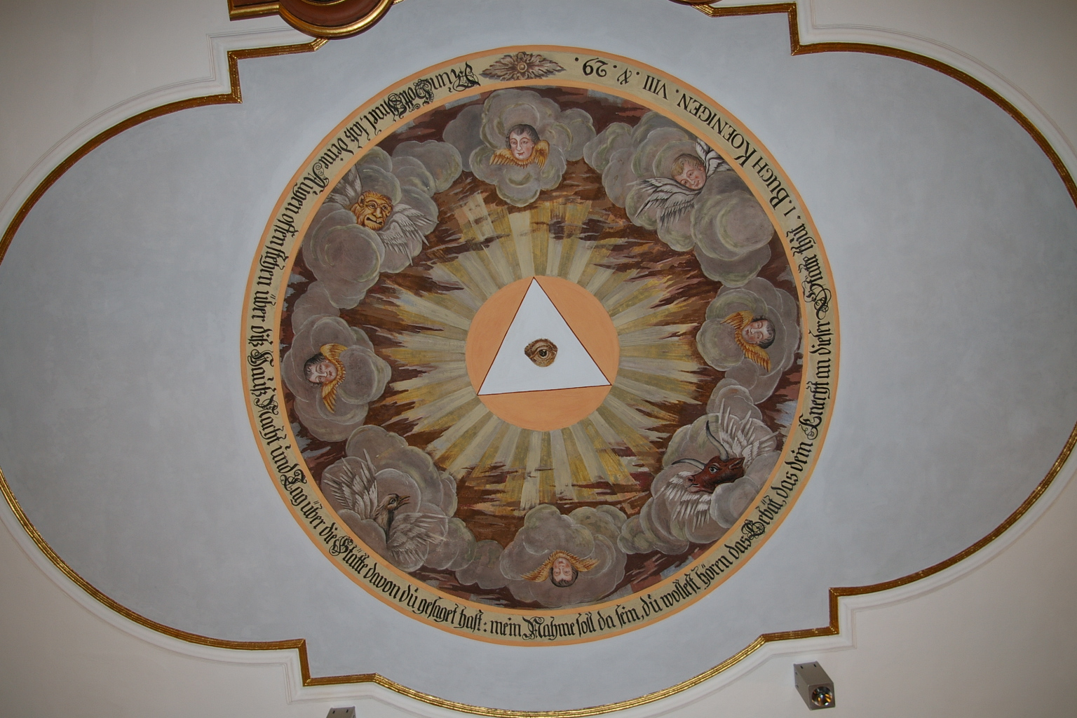 Deckenbild der Evangelischen Kirche Rupppertsburg, Laubach, Landkreis Gießen, Hessen, Deutschland